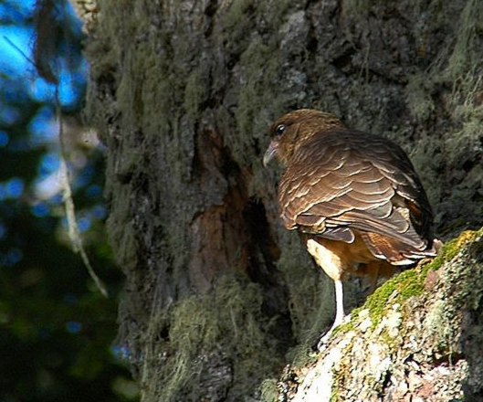 Milvago chimango ssp.temucoensis